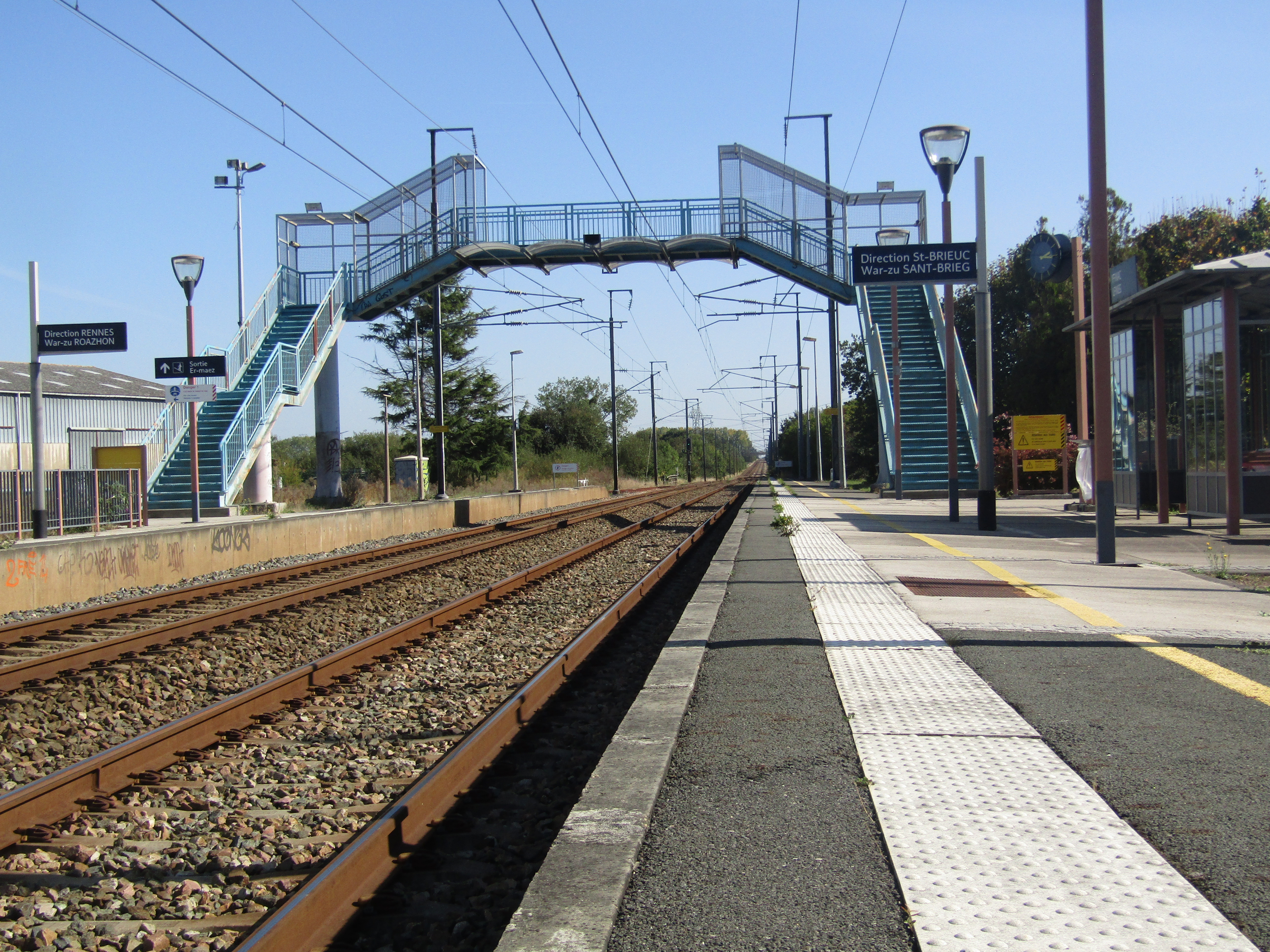 Les voies vue en direction de Rennes; La passerelle.